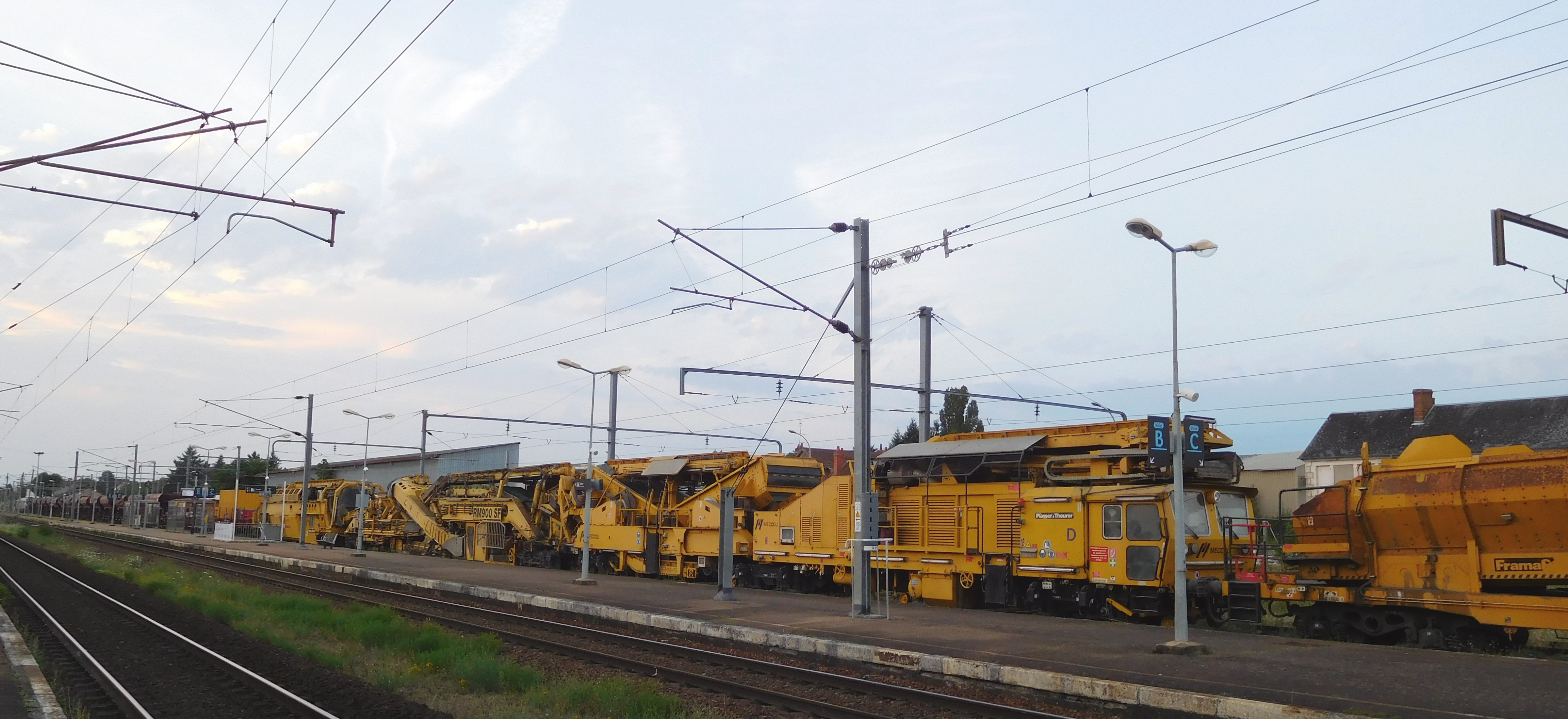 Dégarnisseuse-cribleuse Plasser & Theurer RM 900 SF (vue partielle) ; au loin, une locomotive SNCF Class BB 75000, livrée Akiem-ETF, en queue. En gare de Cosne-sur-Loire (Nièvre, France).